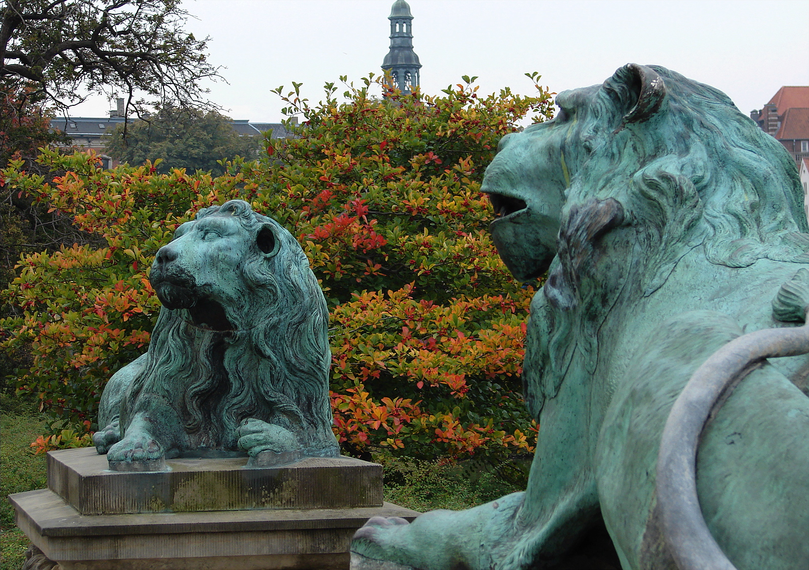 Hvilende løver foran Rosenborg Slot, Kongens Have, København